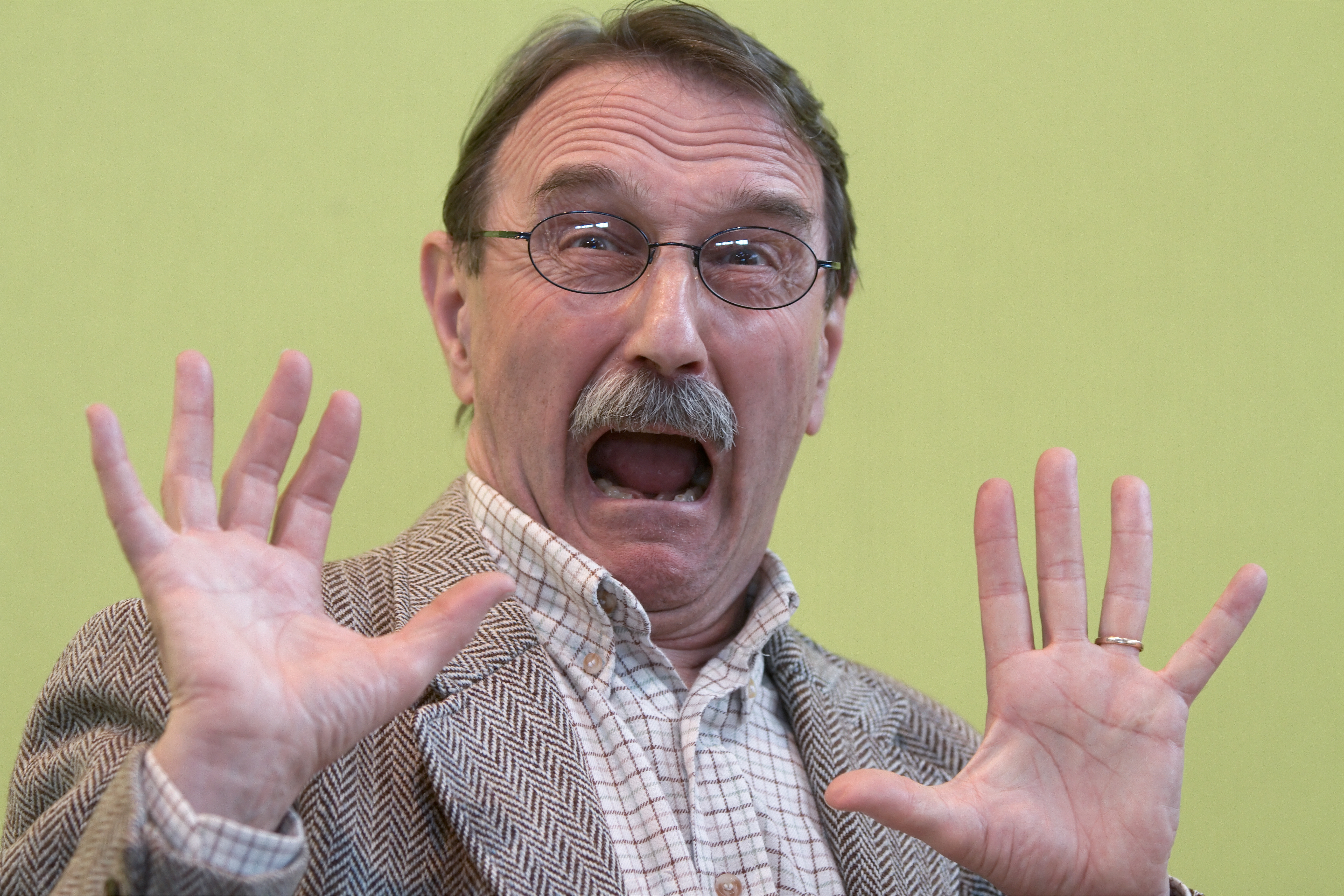 Jean-Noël Blanc au Salon du livre de Paris pour une séance de lecture au Club Jeunesse.